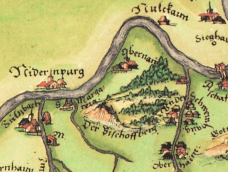 Obernau auf der Spessartkarte von Paul Pfinzing von 1594